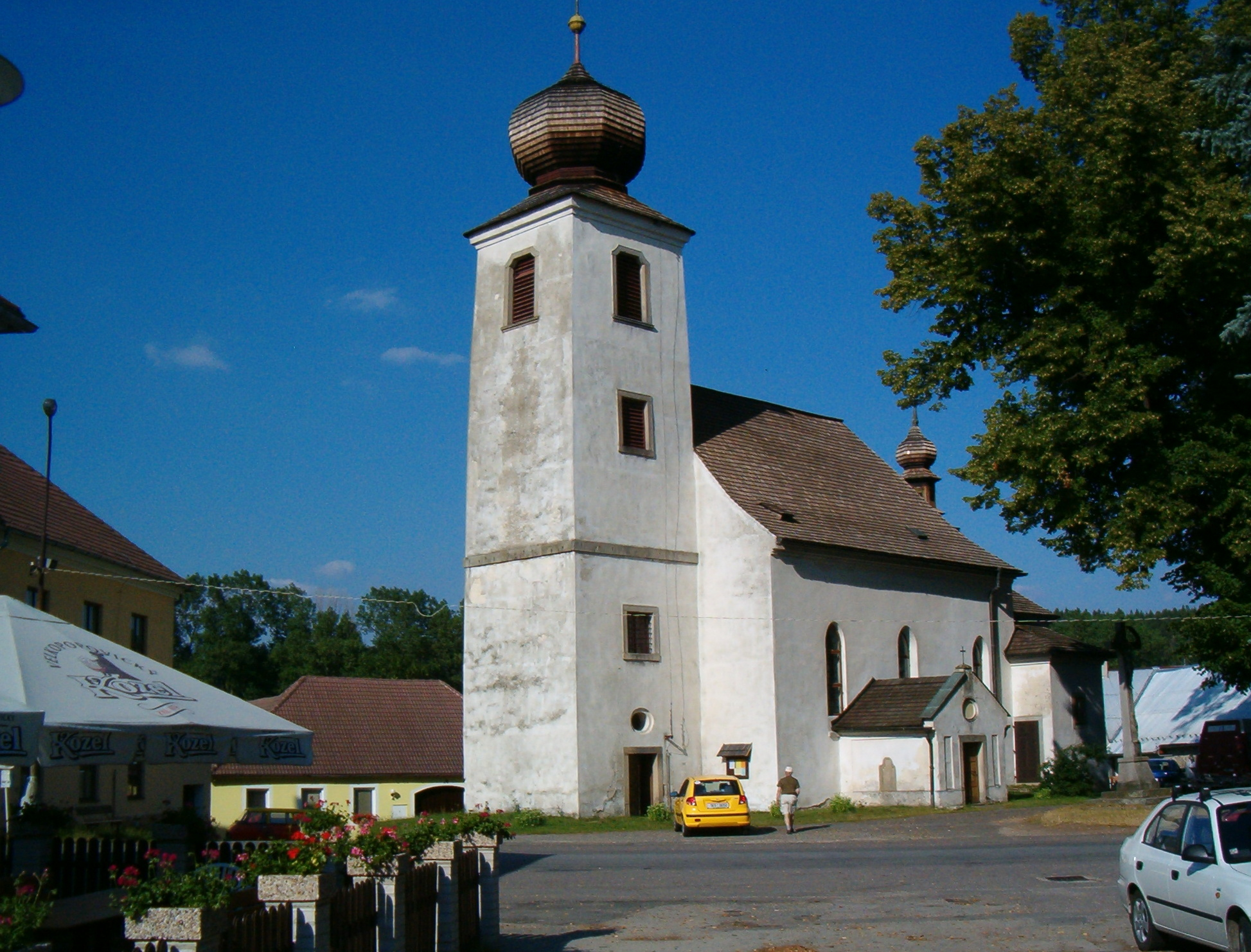 Kostel sv. Jana Křtitele v Českém Rudolci